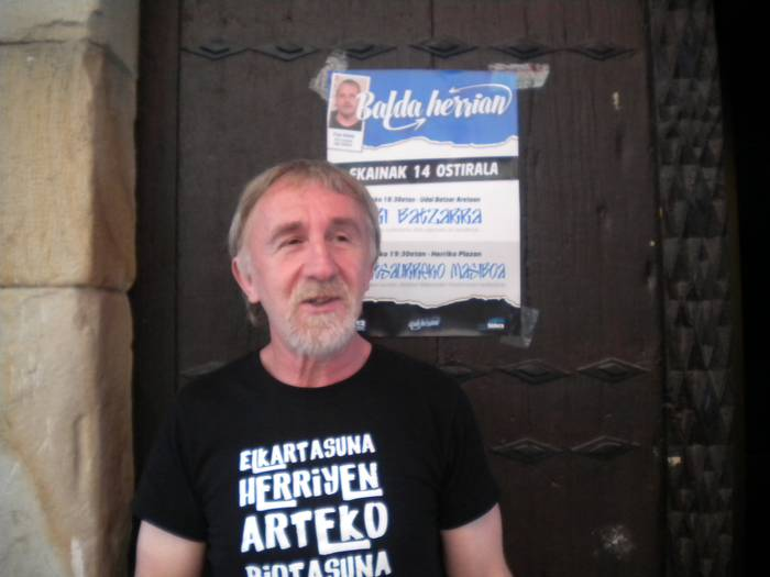 Arbizuko alkate hautatu berria, Francisco Javier Razkin Flores, 2019ko ekainaren 15ean